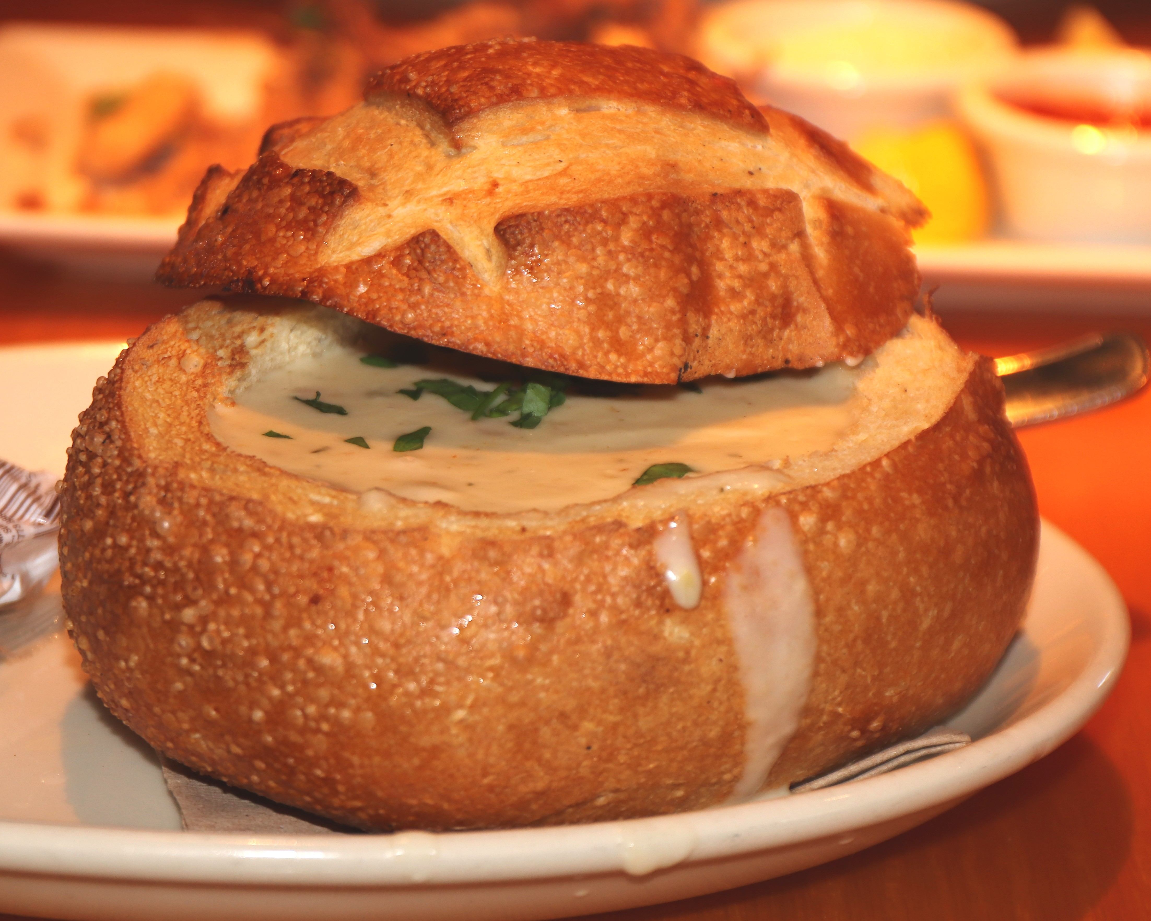 B.J. Restaurant & Brewery